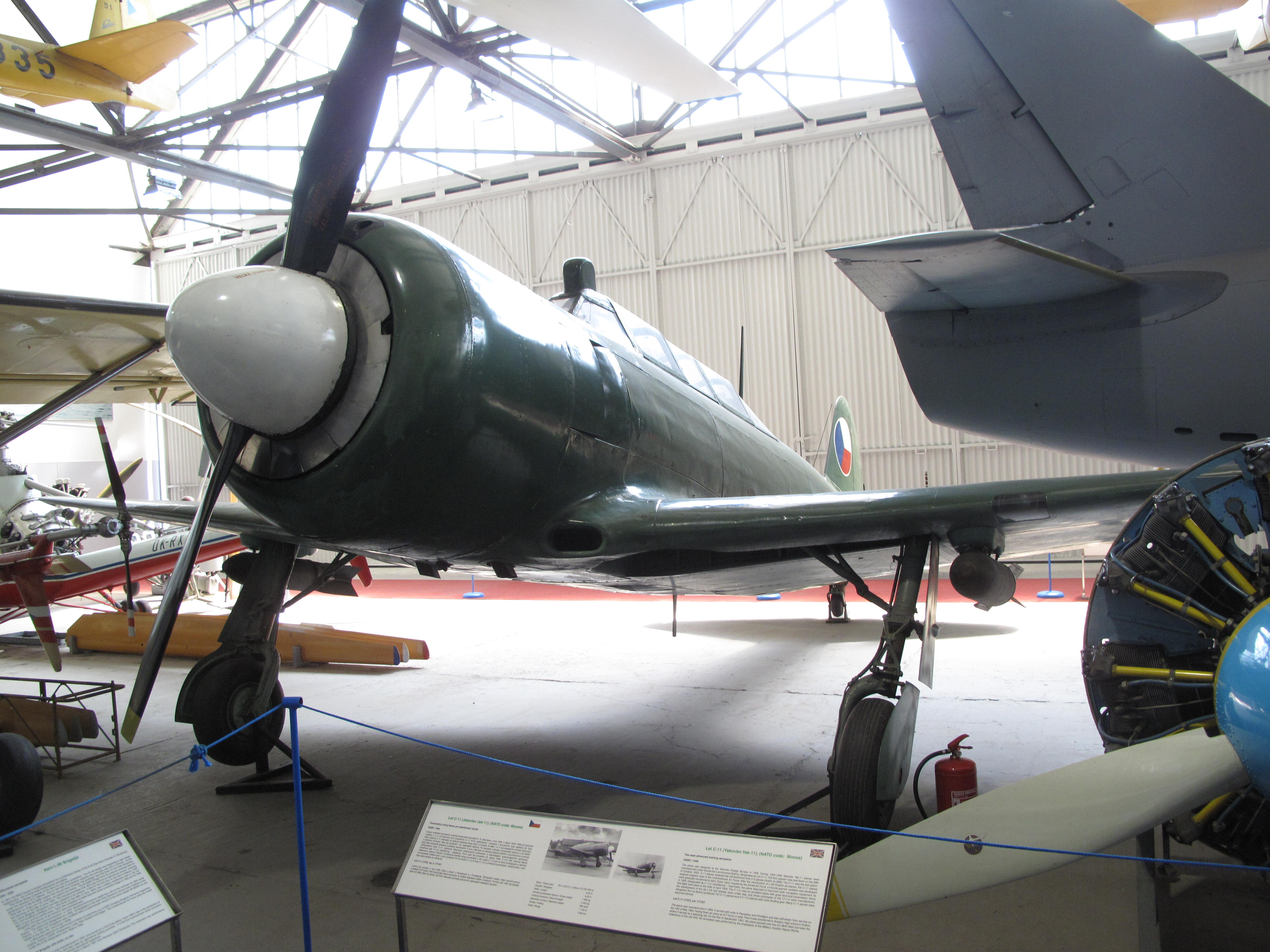 Let- C-11, license build Yak-11 ; Letecké muzeum Kbely